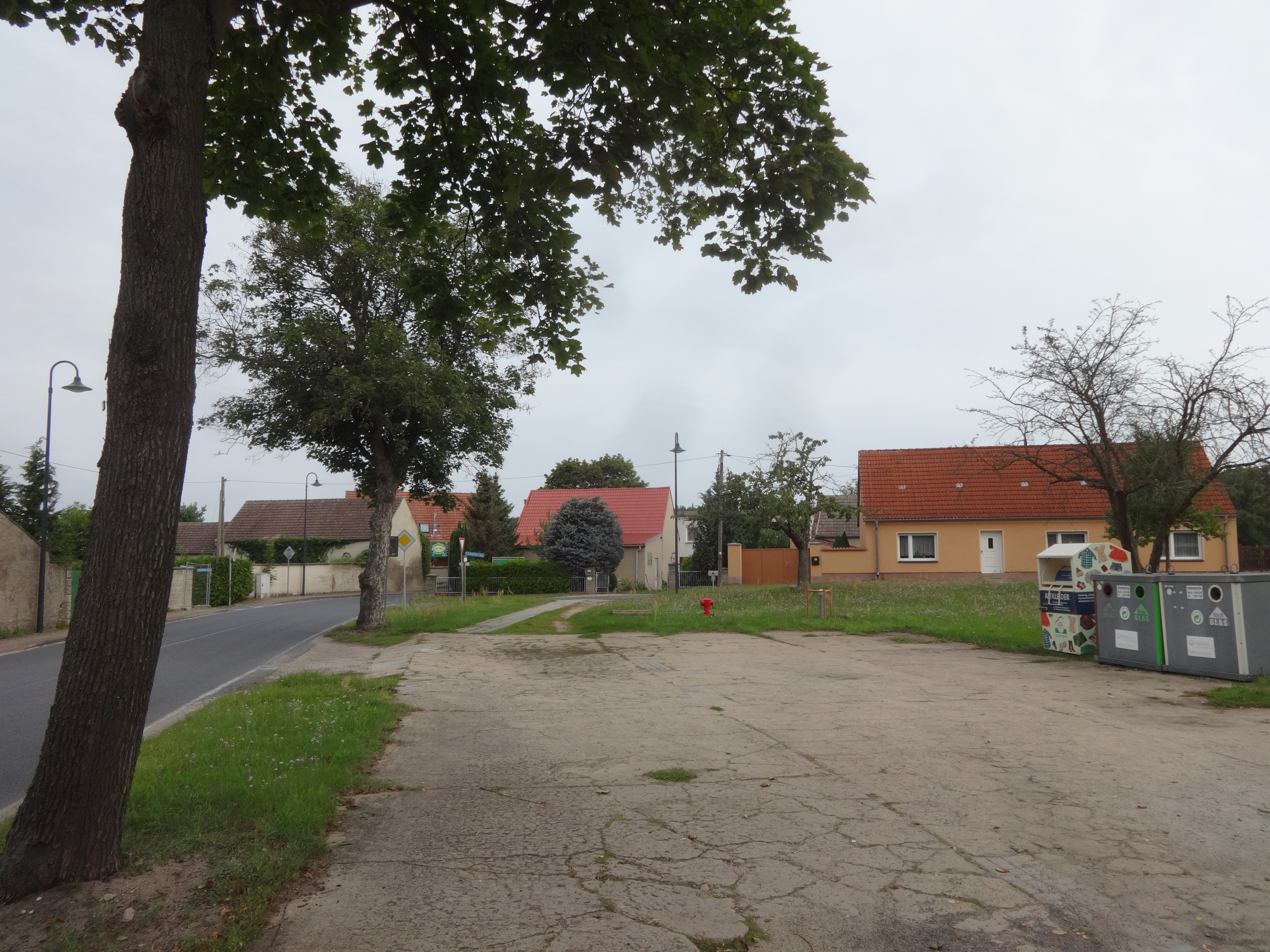 Dorfstraße in Berkenbrück, Gemeinde Nuthe-Urstromtal in Brandenburg